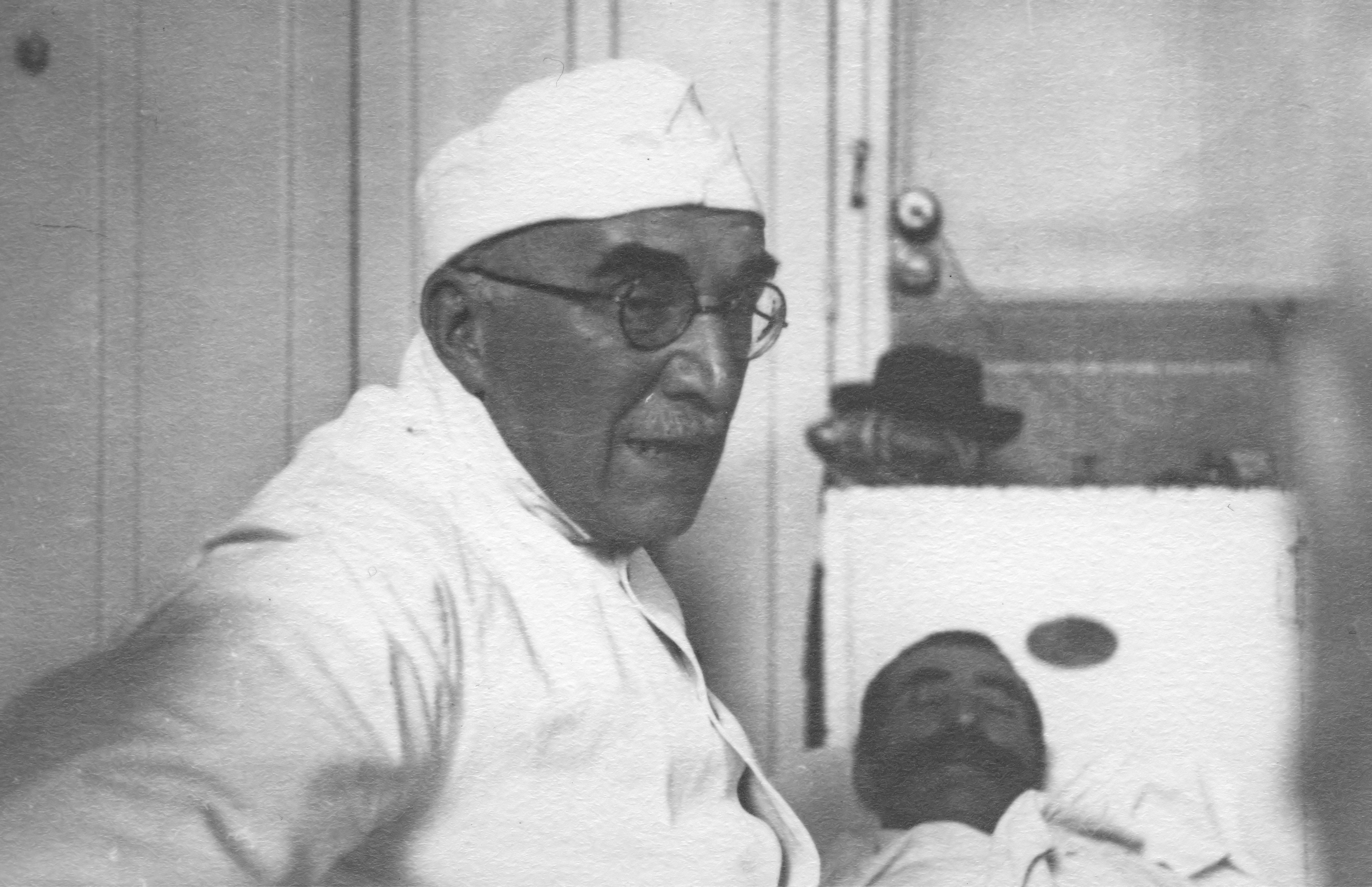 Hôpital Lyon Léon Bérard